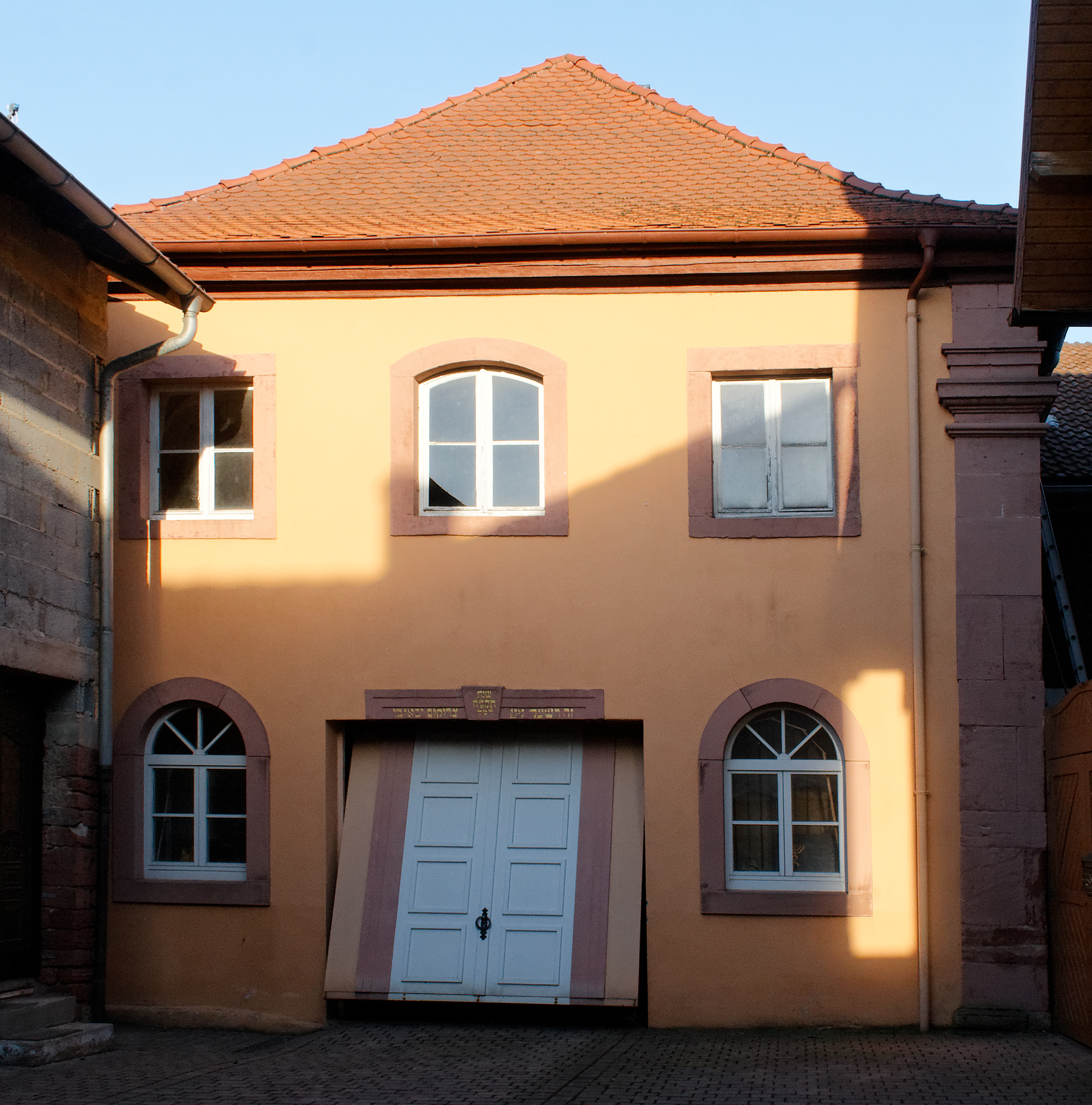 Ehemalige Synagoge in Kleinheubach (Bayern), Walmdachbau aus dem 18. Jahrhundert.